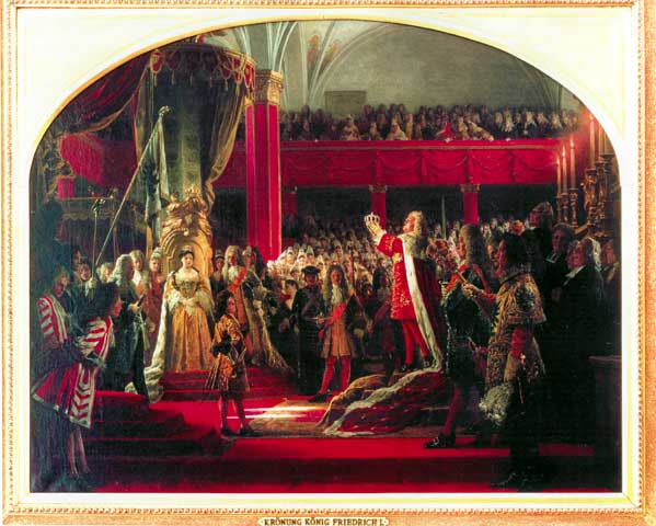 Die Krönung Friedrich I., Gemälde von Anton von Werner - 1887